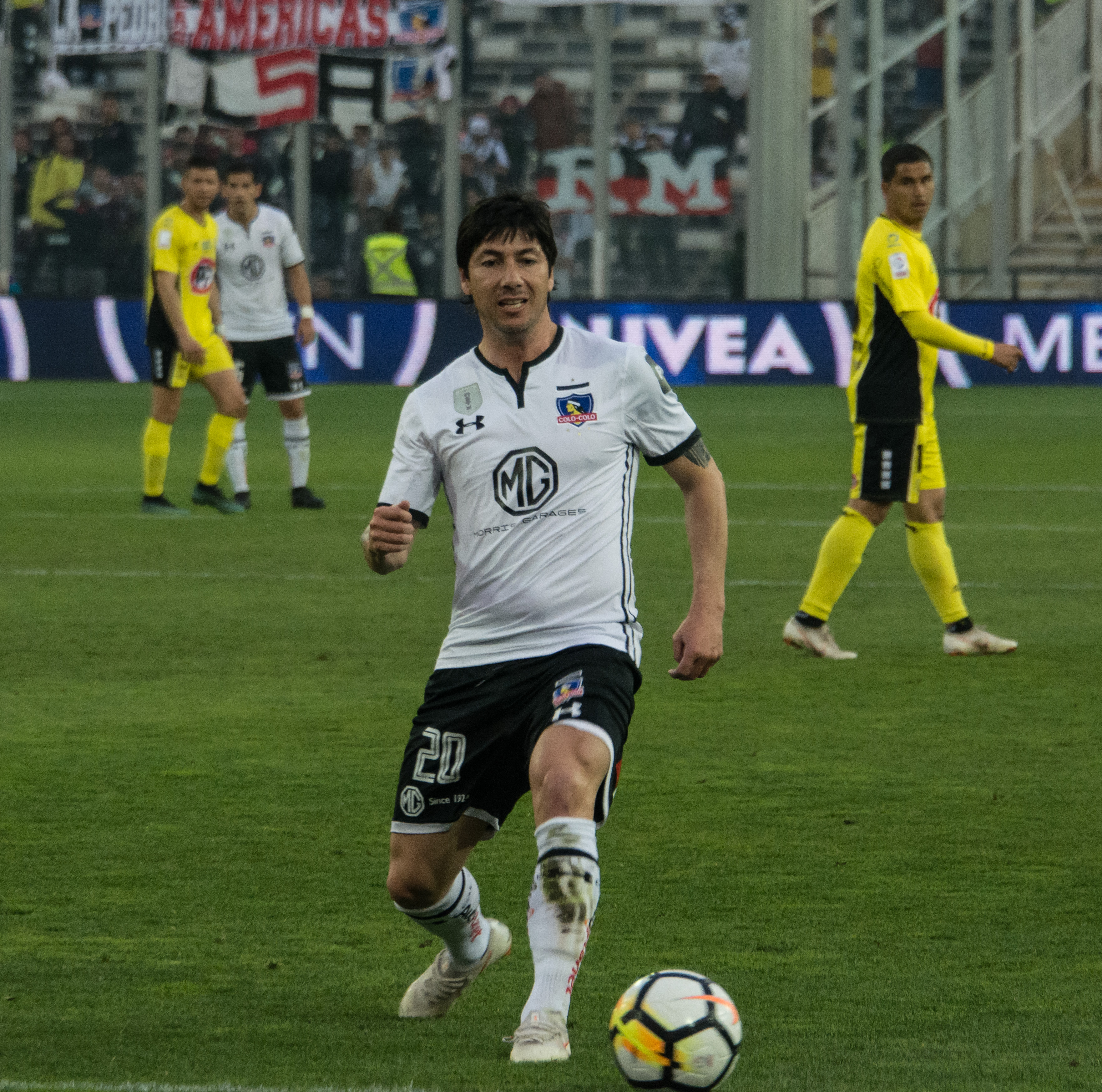 Jaime Valdés, Colo-Colo v San Luis, Estadio Monumental, Macul, Santiago, Chile.